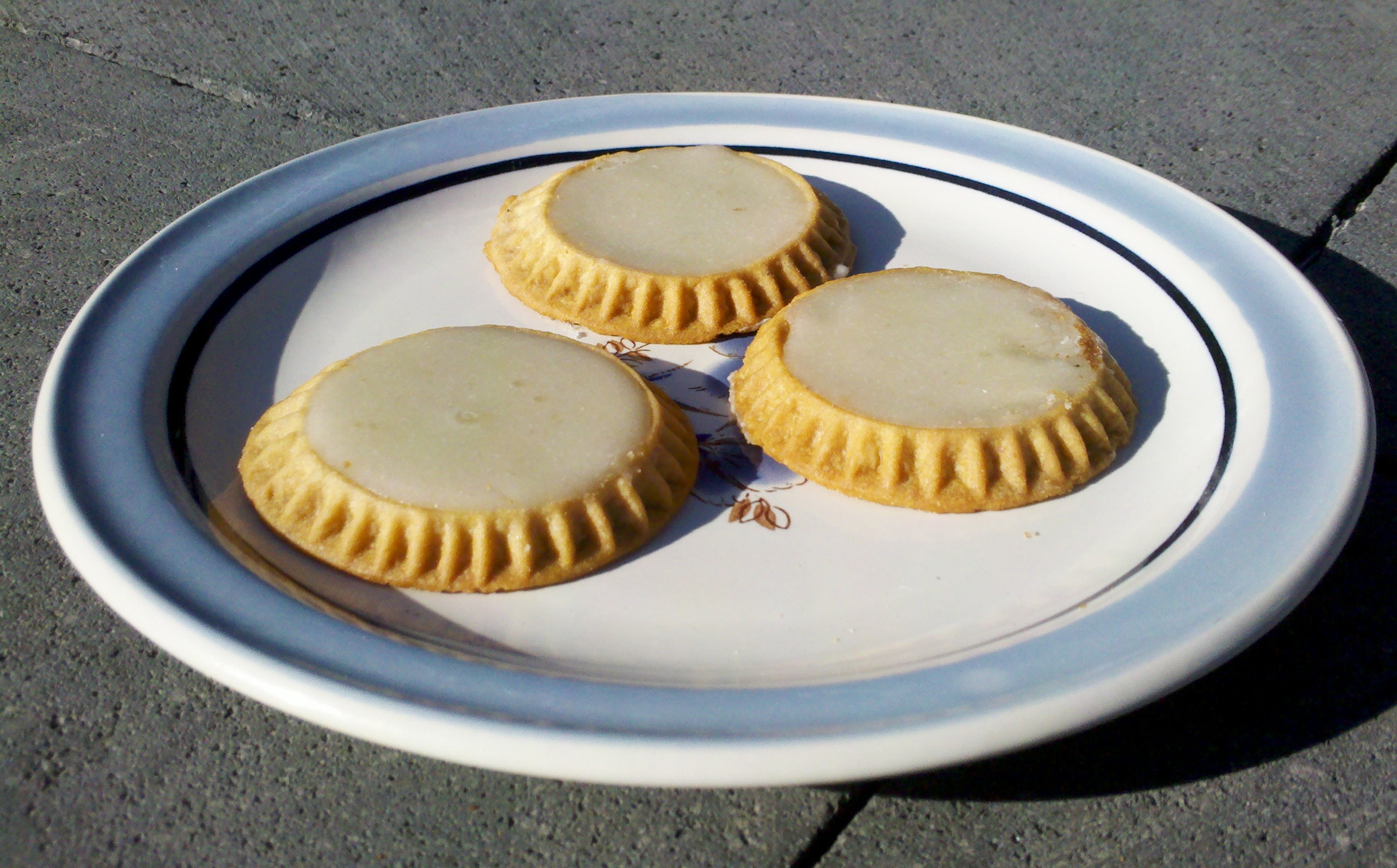 Tortitas de Santa Clara, un postre de Puebla, México.